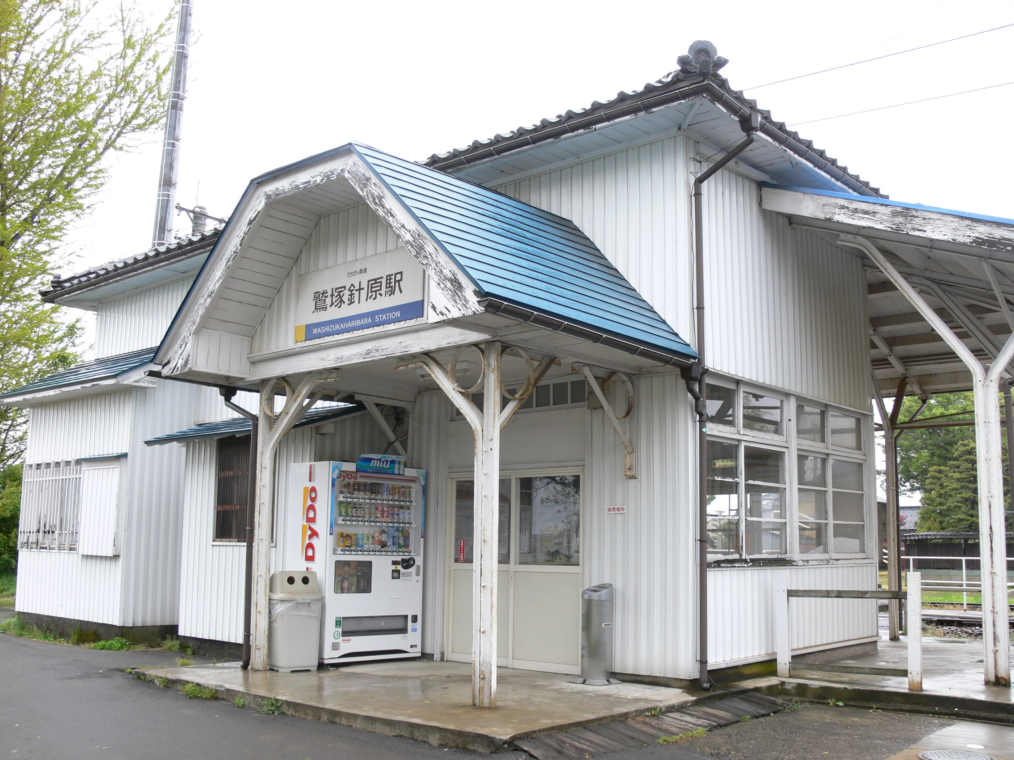 Washizuka-Haribara Station